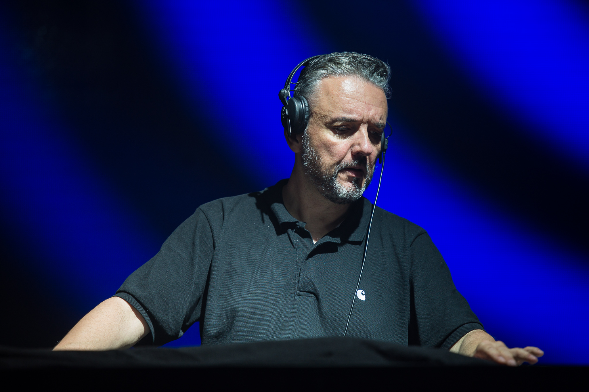 Deichbrand,ESK Events & Promotion GmbH,Electric Island Stage,Festival,Konzert,Livekonzert,Livemusik,Marc Romboy,Sea-Airport Cuxhaven/Nordholz,See-Flughafen Cuxhaven/Nordholz,Seeflughafen Cuxhaven/Nordholz